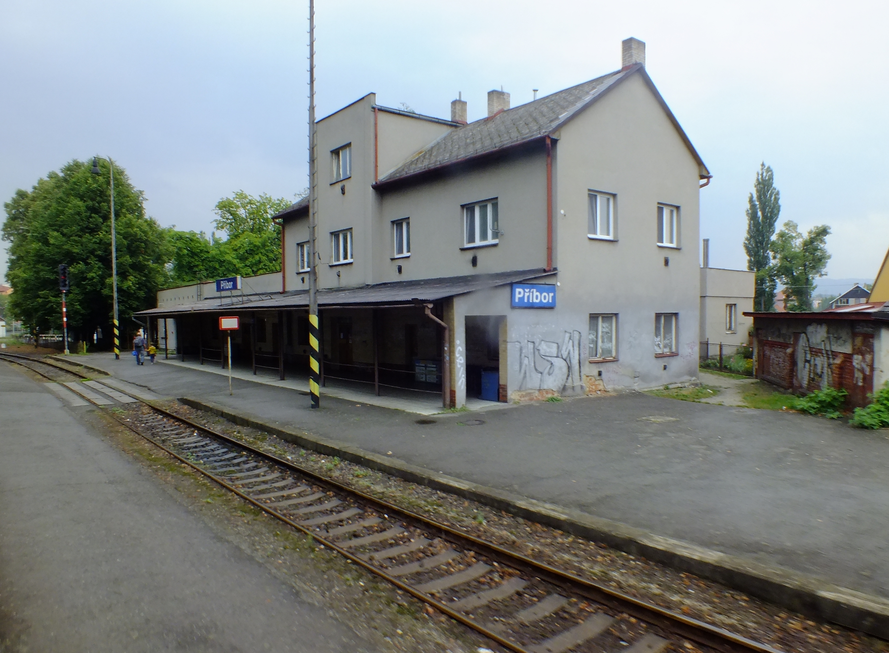 Staniční budova